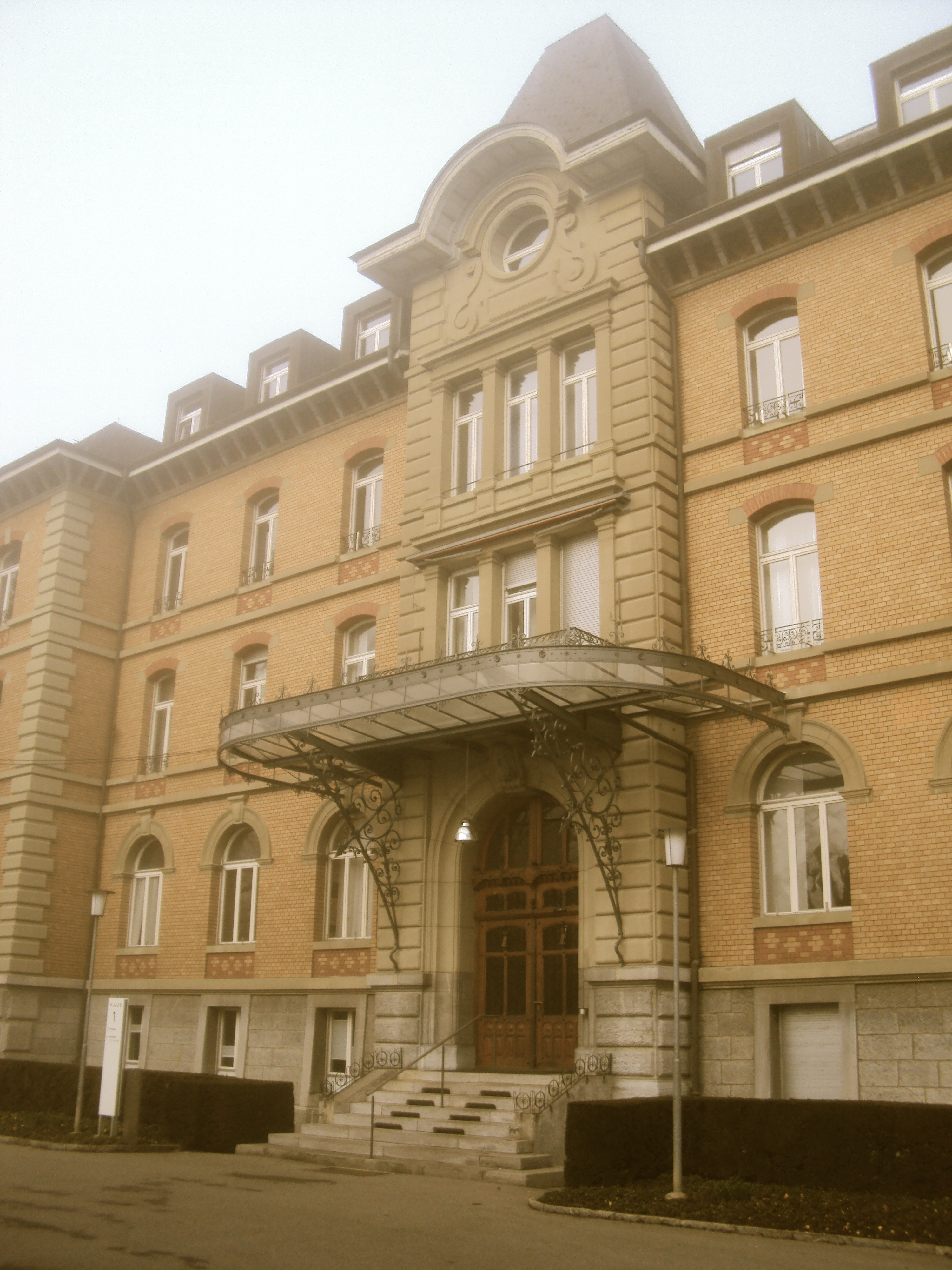 Haupteingang des PZM